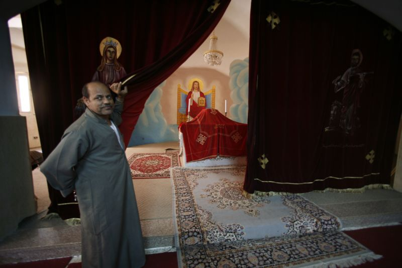 Алтарь Кафедрального собора Св. Девы Марии и Св.Симеона, Каир, Египет.